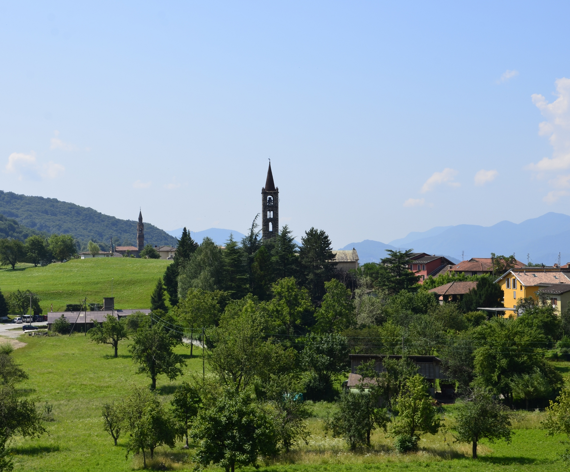 Chiesa di Sant'Antonio Abata a Sala Capriasca e Chiesa parrocchiale dei SS. Antonio da Padova, Giacomo e Filippo a Vaglio